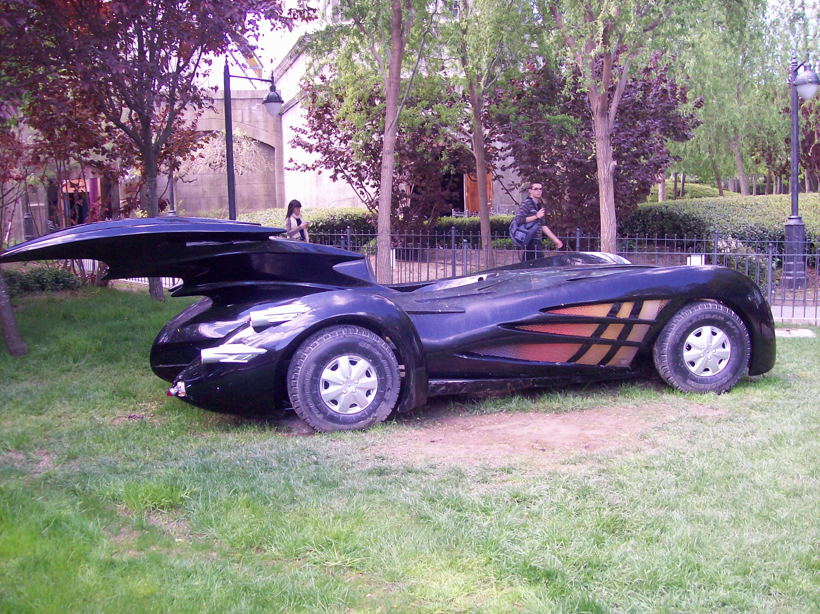 De Batmobiel in Parque Warner Madrid